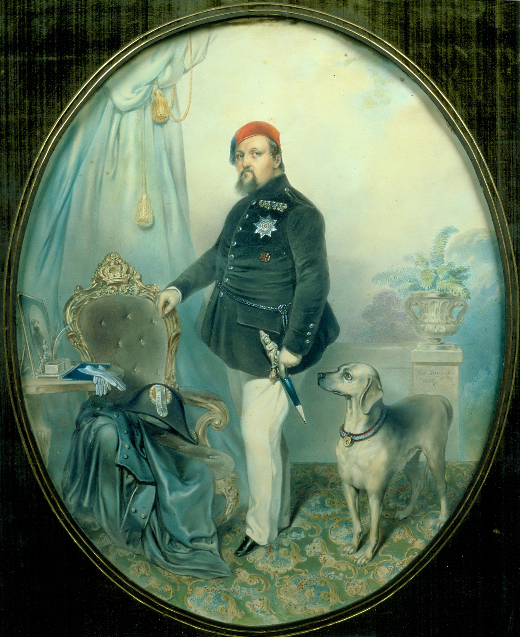 King Frederick VII of Denmark.